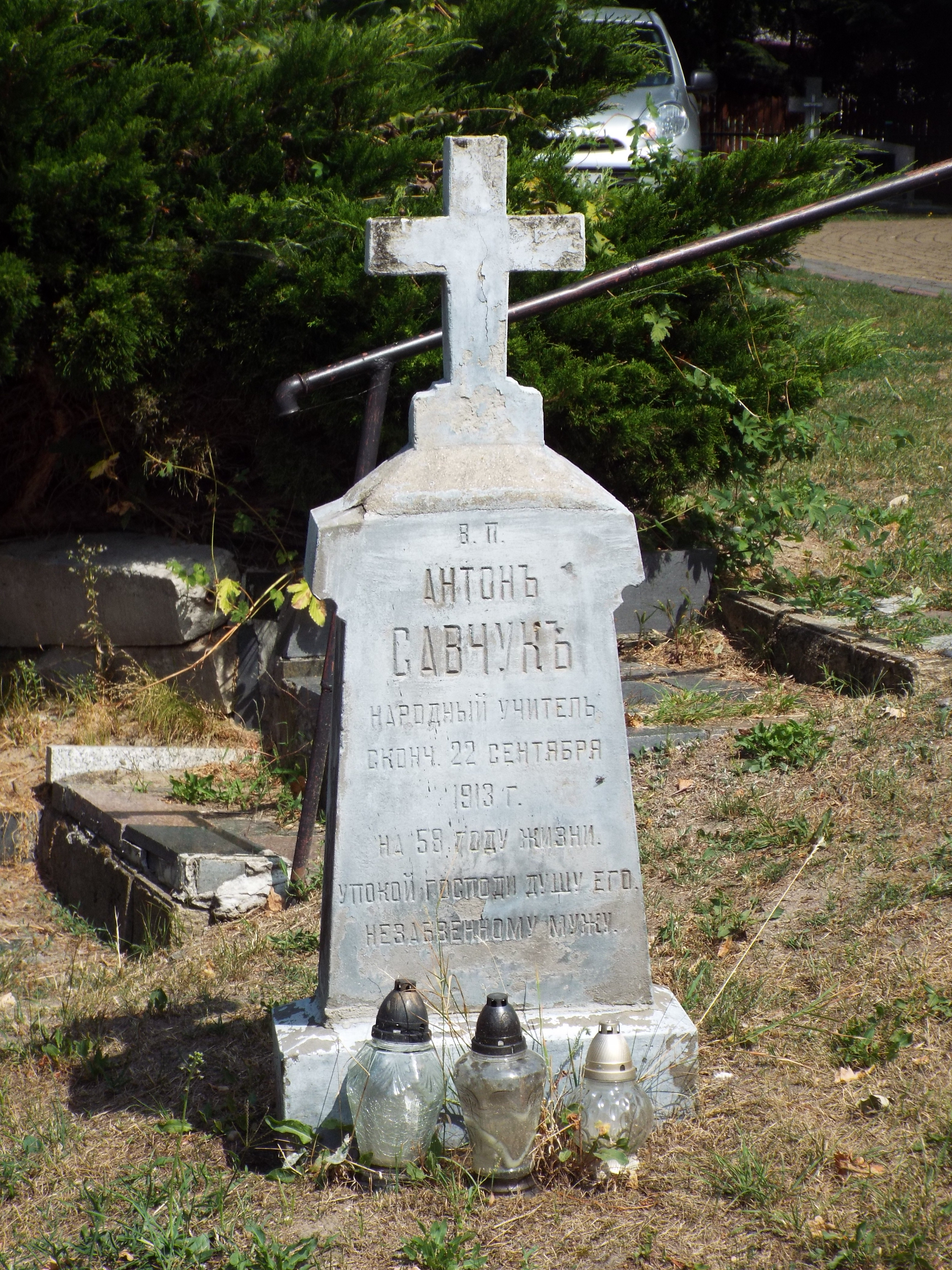 Biała Podlaska, cmentarz prawosławny - nagrobek Antona Sawczuka